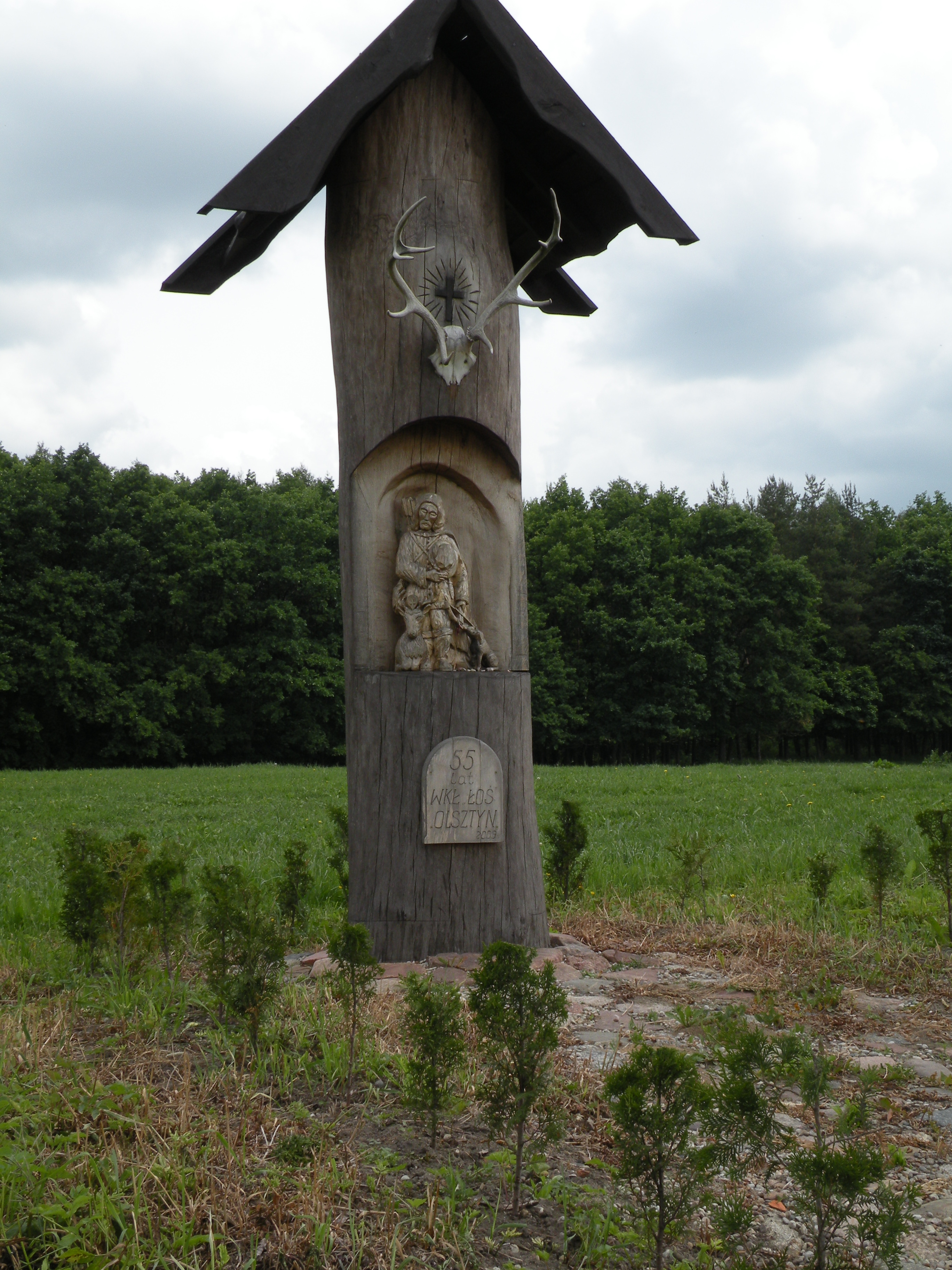 Bałdy, kapliczka myśliwska